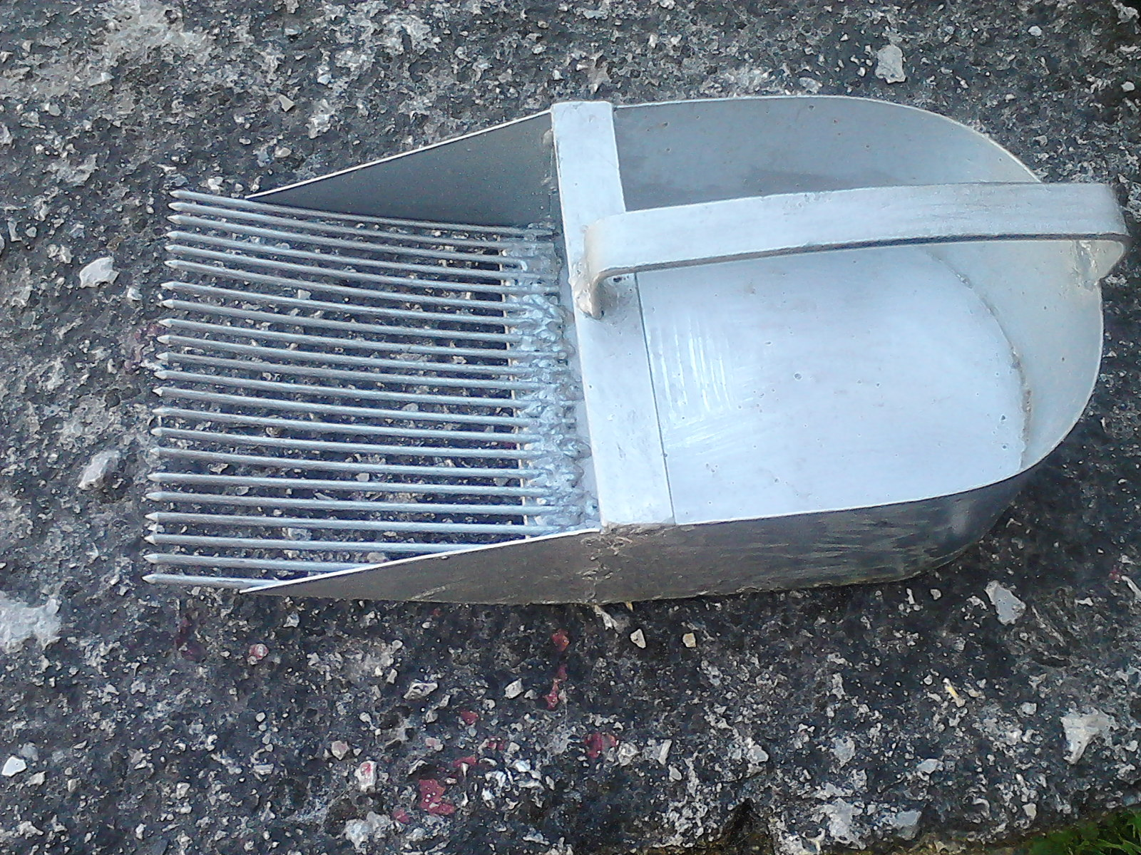 forma semi-ovala ajuta la echilibrarea greutatii si previne obosirea mainii in timpul culesului